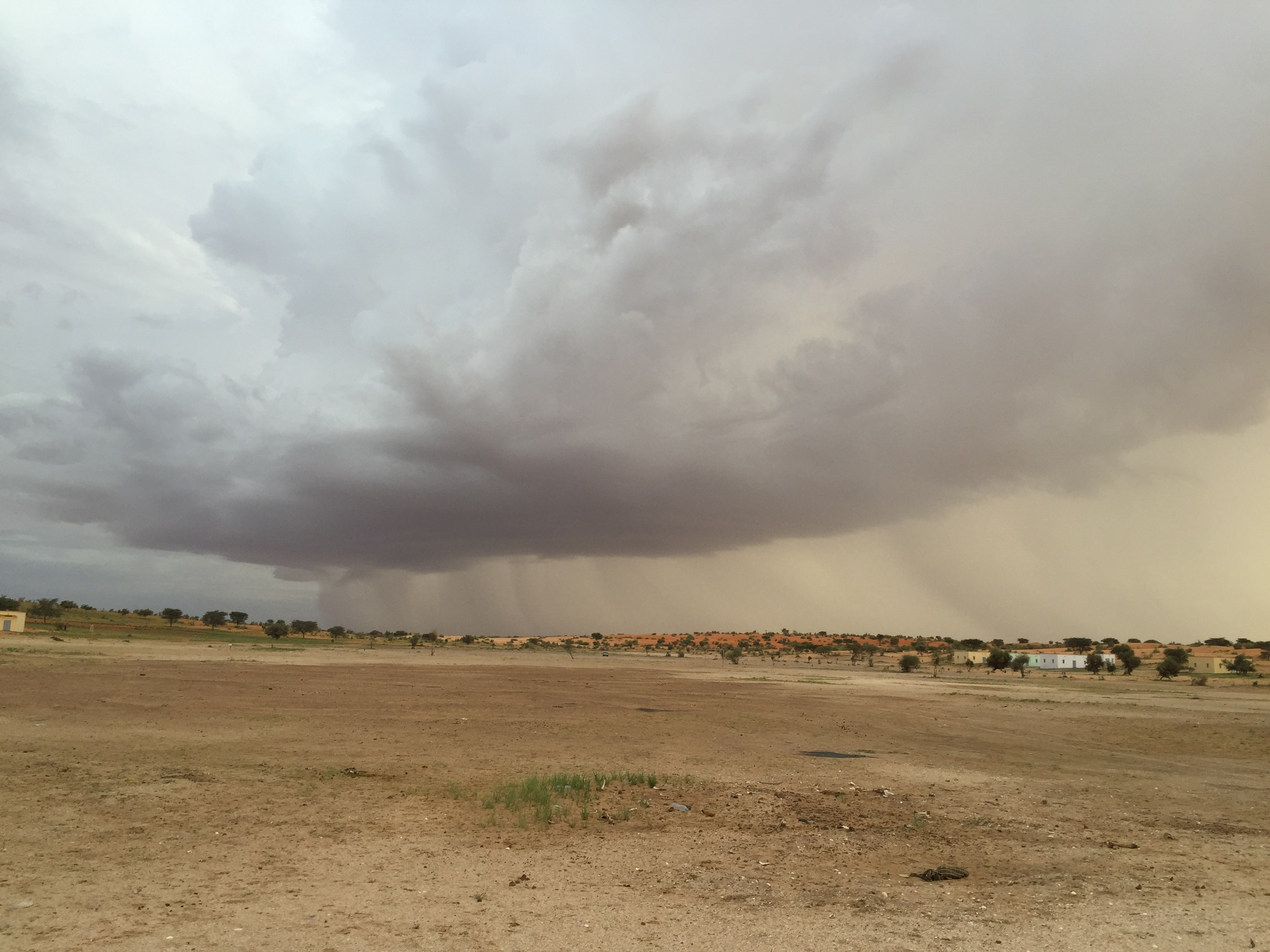 هذه صورة لغيمة مطرية في قرية بدر بمقاطعة بتلميت التابعة لولاية الترارزة الموريتانية.